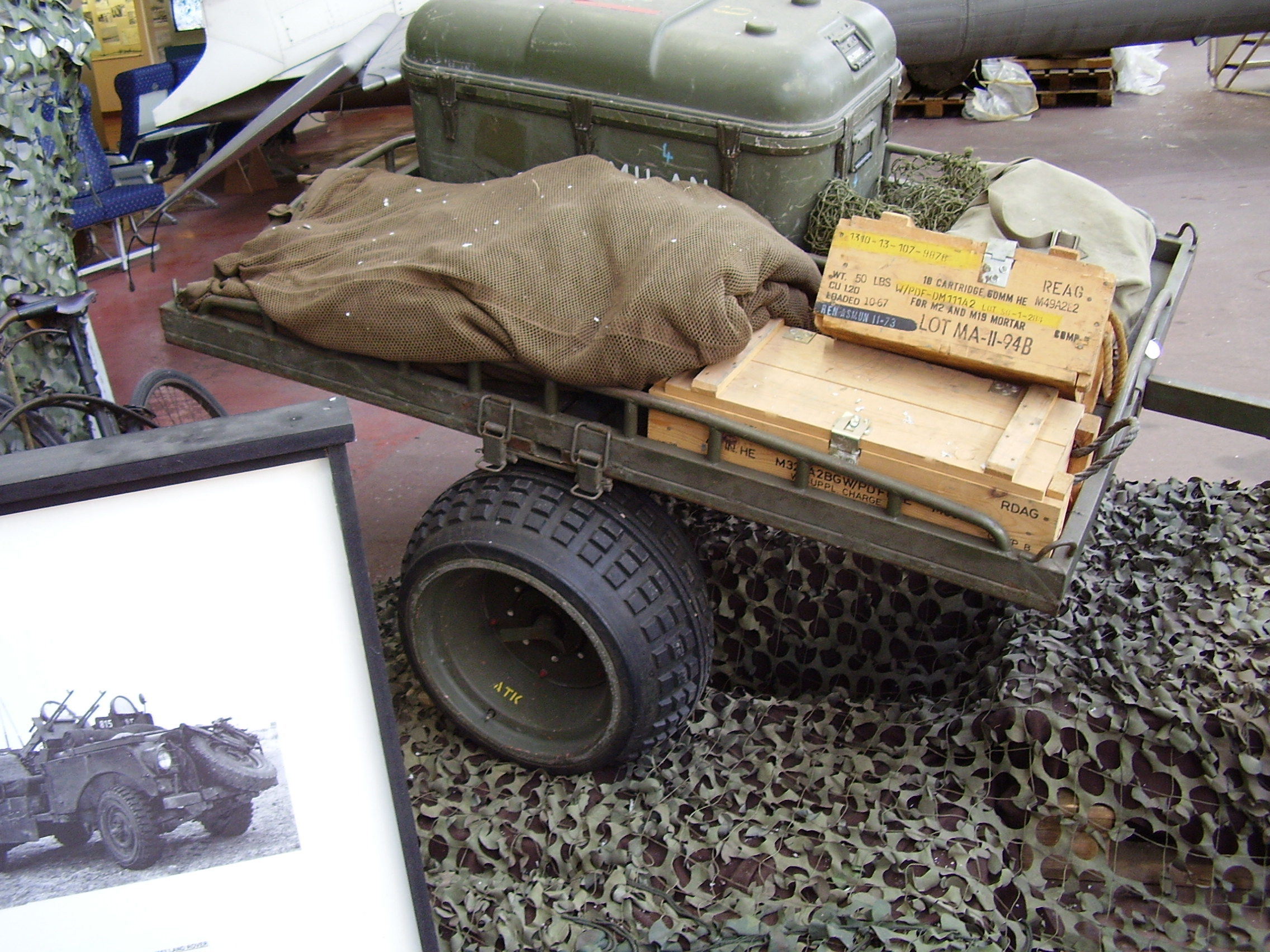 Royal Military Museum Brussels, Musée Royal de l'Armée, Koninklijk Museum van het Leger en de Krijgsgeschiedenis, AS 24 (produced by FN Hesral), discription in image Image:Royal Military Museum Brussels 2007 335.JPG